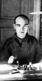 Павел Филонов на Румынском фронте - председатель Исполнительного военно-революционного комитета Придунайского края (1917).